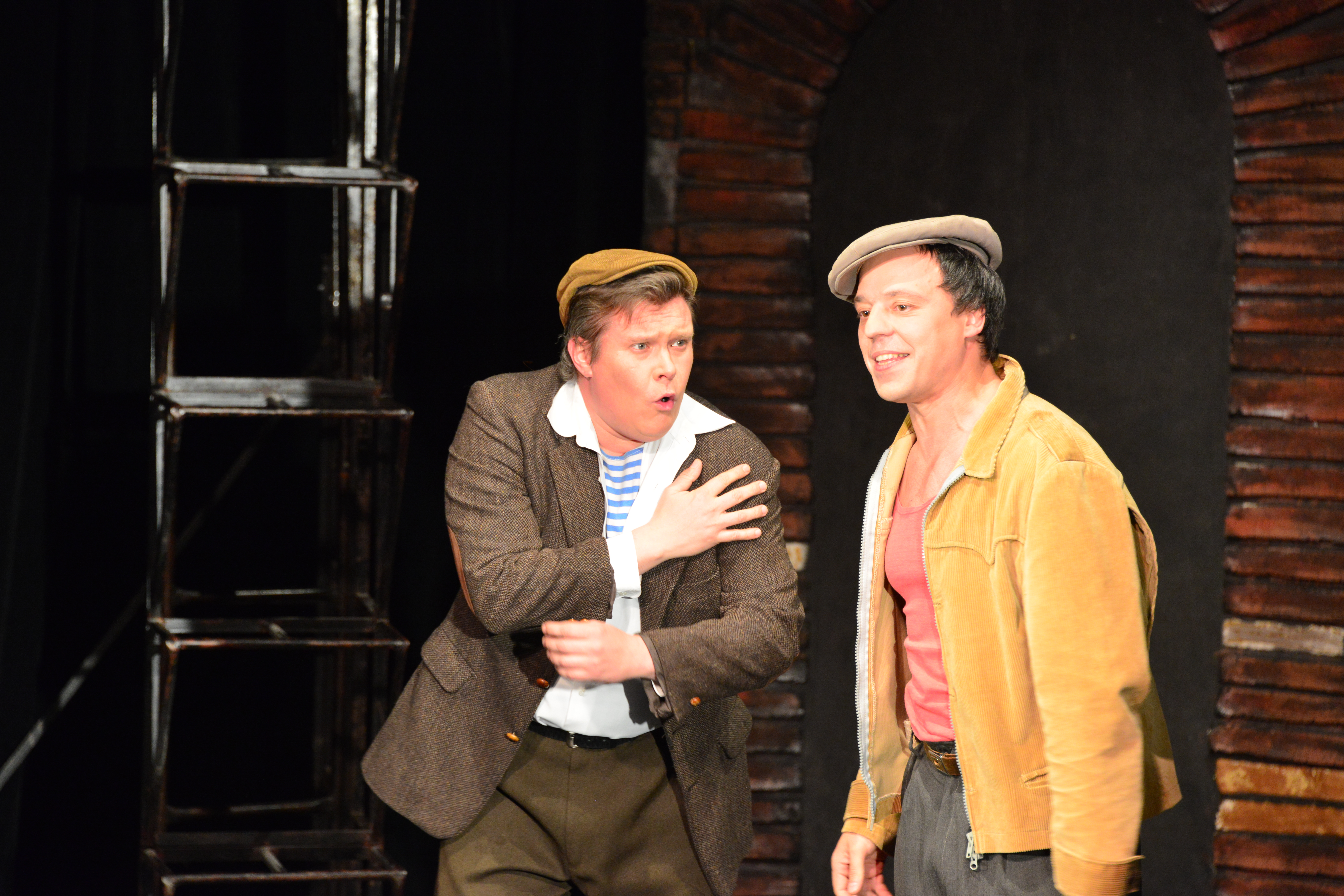 Спектакль «Роман о девочках» на сцене театра «У Никитских ворот» 08.10.2017